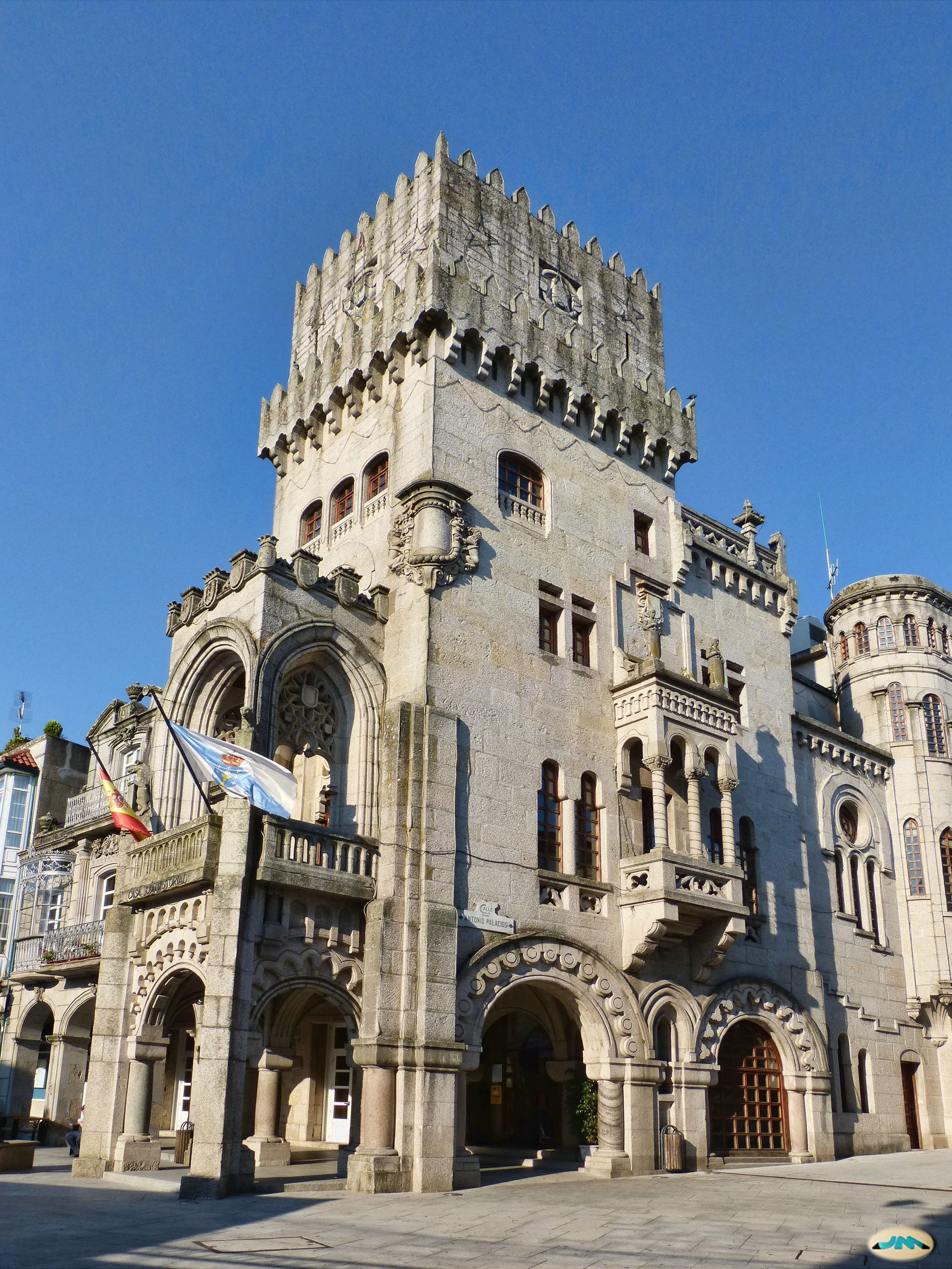 Obra de Antonio Palacios